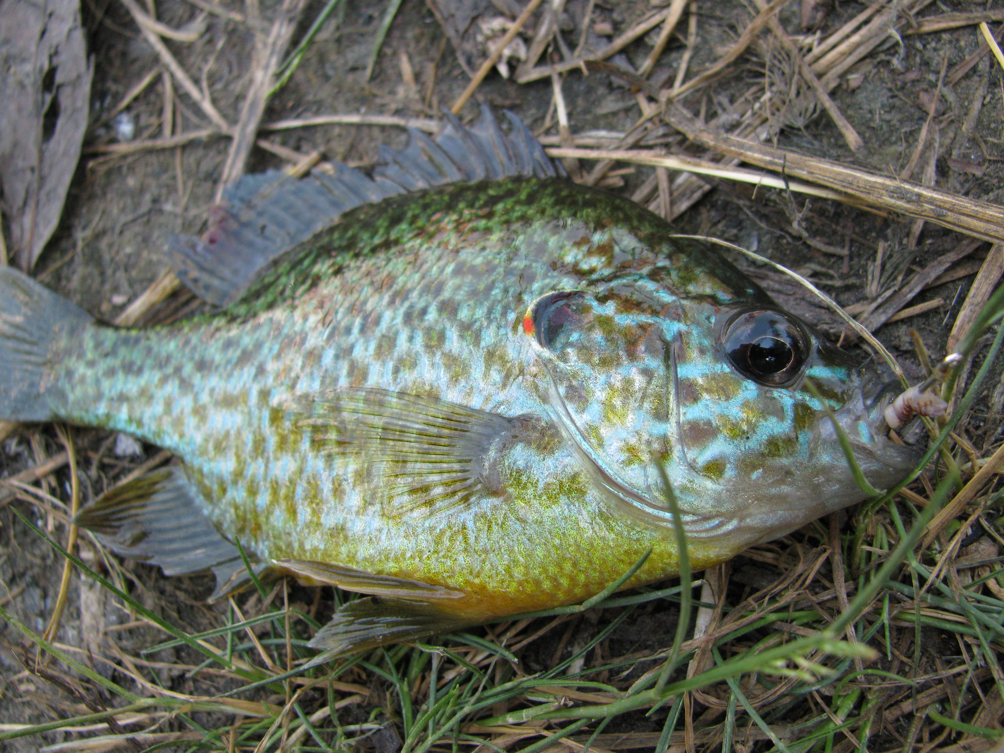 Пойман на нижнем Днепре